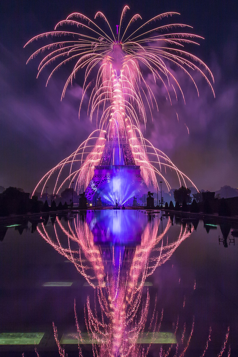 14 juillet sur la Tour Eiffel, par Groupe F, 2015